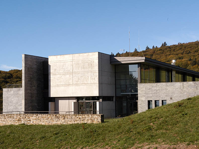 Bibracte : le centre de recherche à Glux-en-Glenne